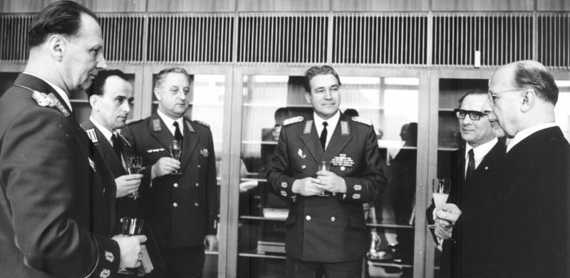 Generalsernennung durch Walter Ulbricht Ernennung von Generälen durch den Staatsratsvorsitzenden [vrnl: Walter Ulbricht, Erich Honecker, NVA-Generäle] Abgebildete Personen: Honecker, Erich: Staatsratsvorsitzender, Generalsekretär des ZK der SED, DDR (PND 118553399) Ulbricht, Walter: Staatsratsvorsitzender, Erster Sekretär des Zentralkomitees (ZK) der SED, Vorsitzender des Nationalen Verteidigungsrates, DDR (PND 118625179)